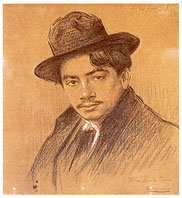 Tomás Morales Castellano. Poeta español.